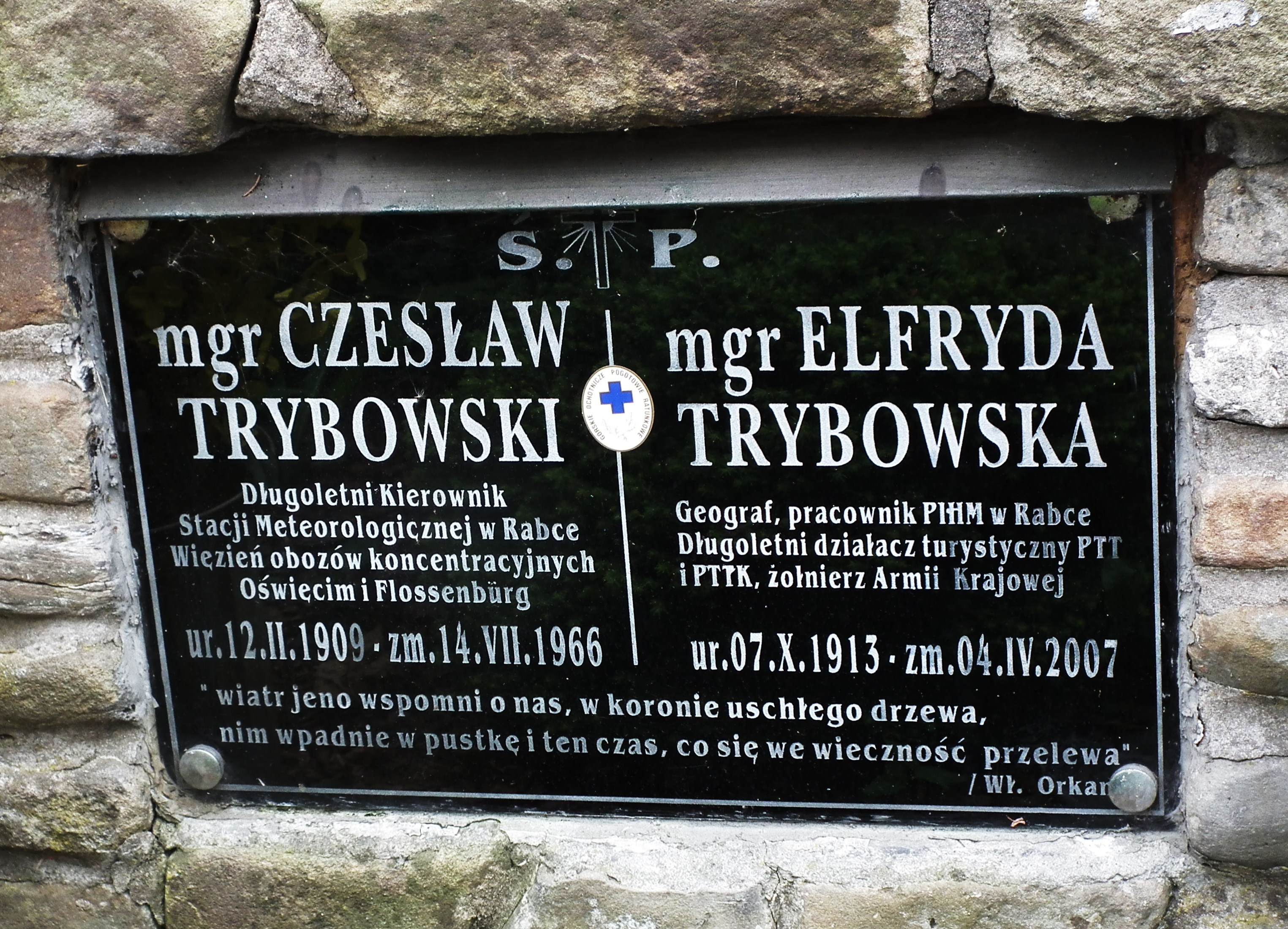 Stary cmentarz w Rabce.